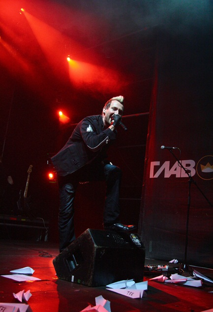 Тревор МакНивен на концерте в Санкт-Петербурге 9 декабря 2012 года